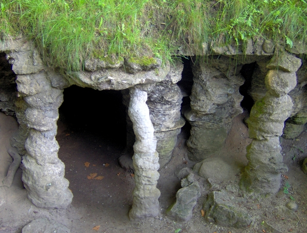 Groty Mechowskie we wsi Mechowo (fragment), powiat pucki, województwo pomorskie, lato 2006 Mechowo Caves (pl: Groty Mechowskie) in village of Mechowo, Puck district, Pomorskie voivdeship, Poland Autor: Krzysztof